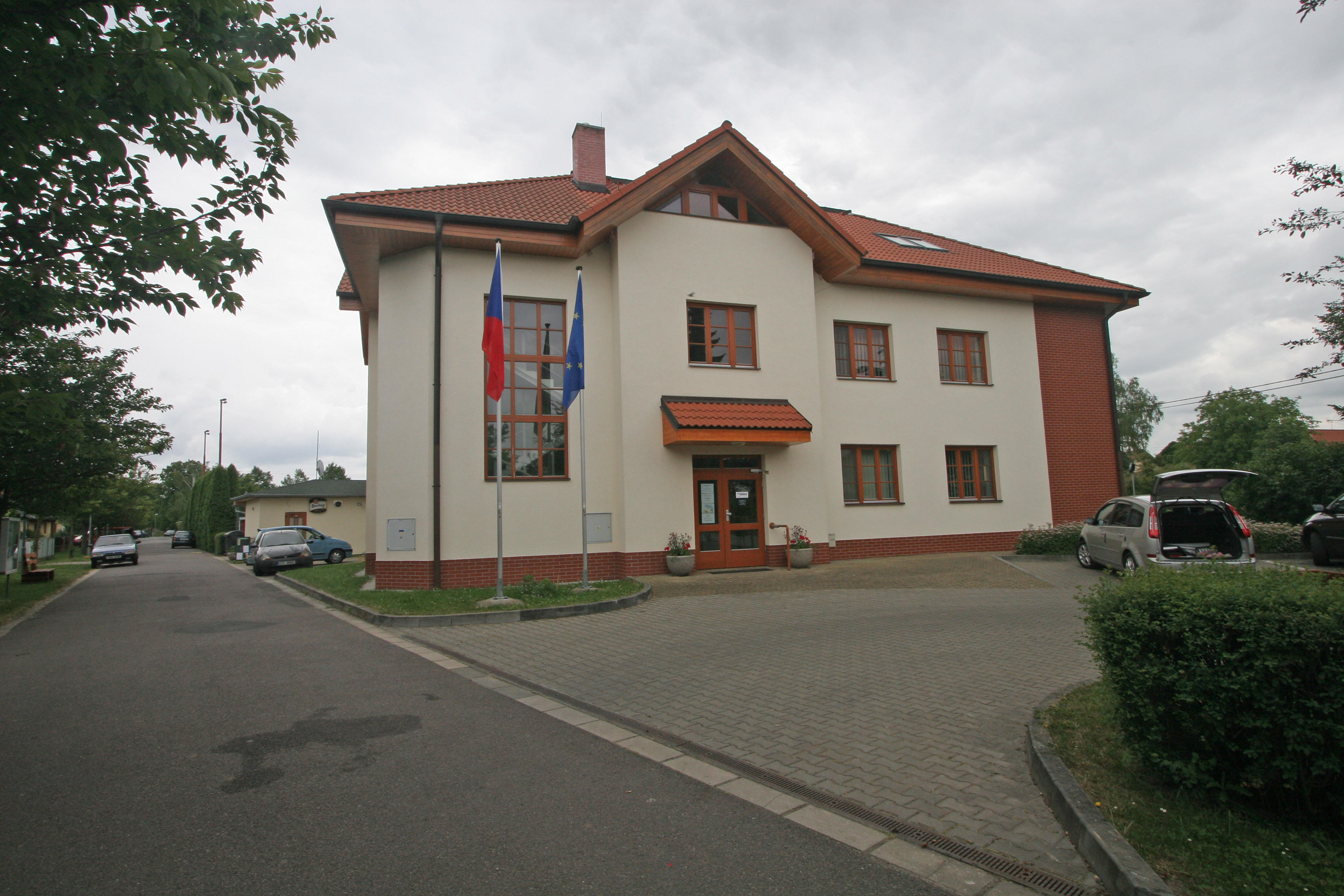 Horní Ředice obecní úřad